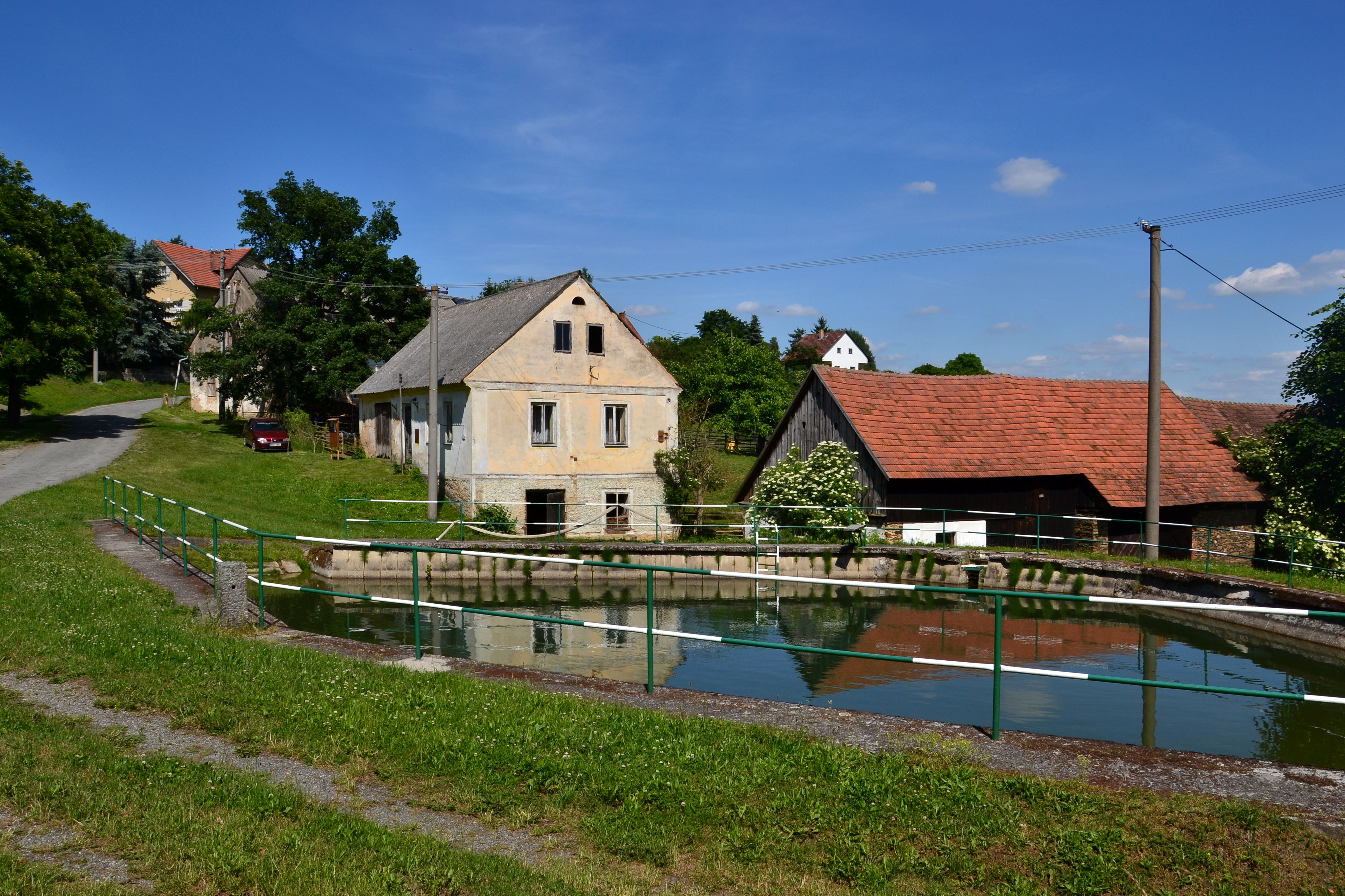 Návesní rybník